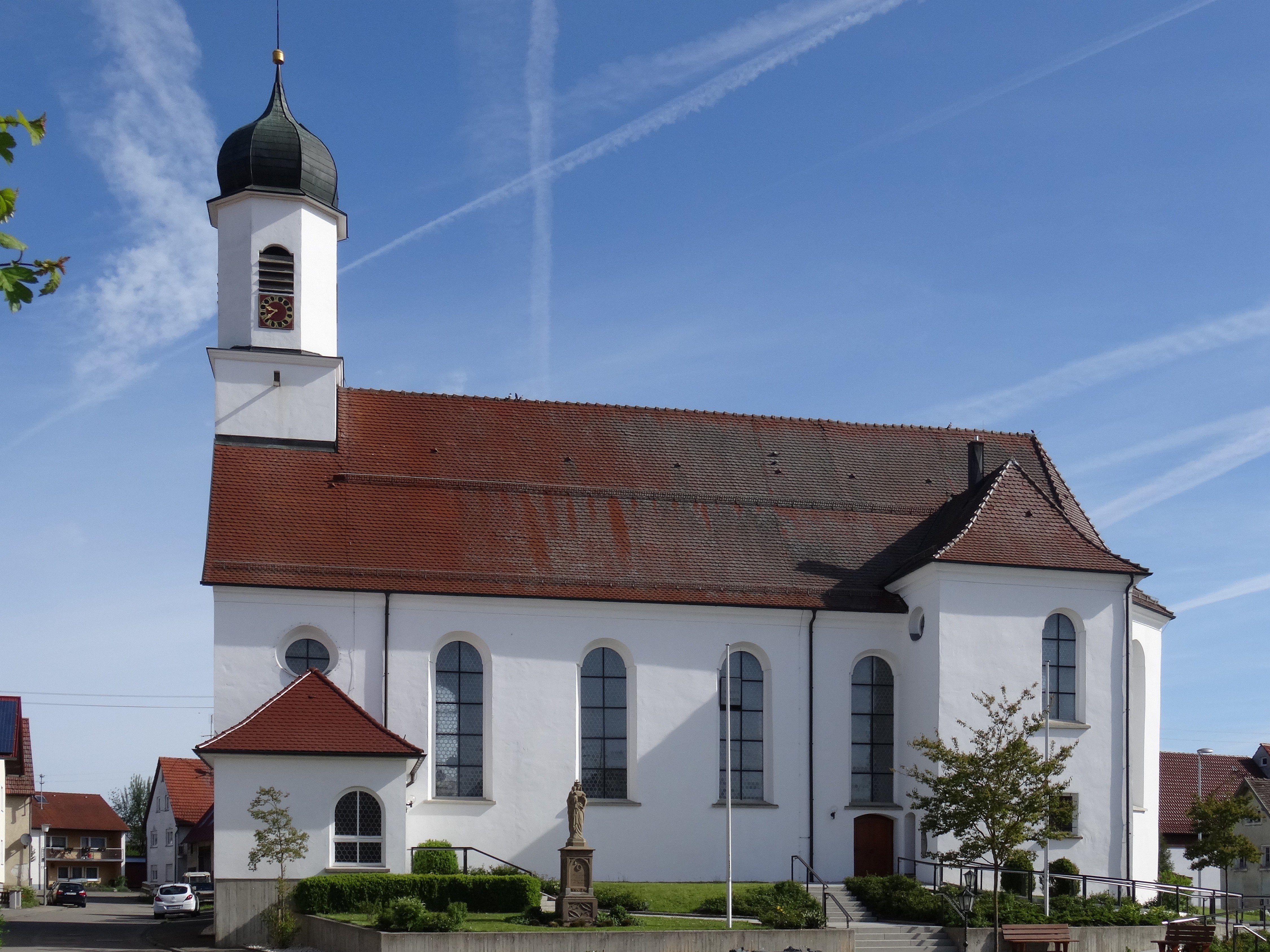 Kath. Kirche St. Nikolaus in Feldhausen. (Feldhausen bei Gammertingen.)